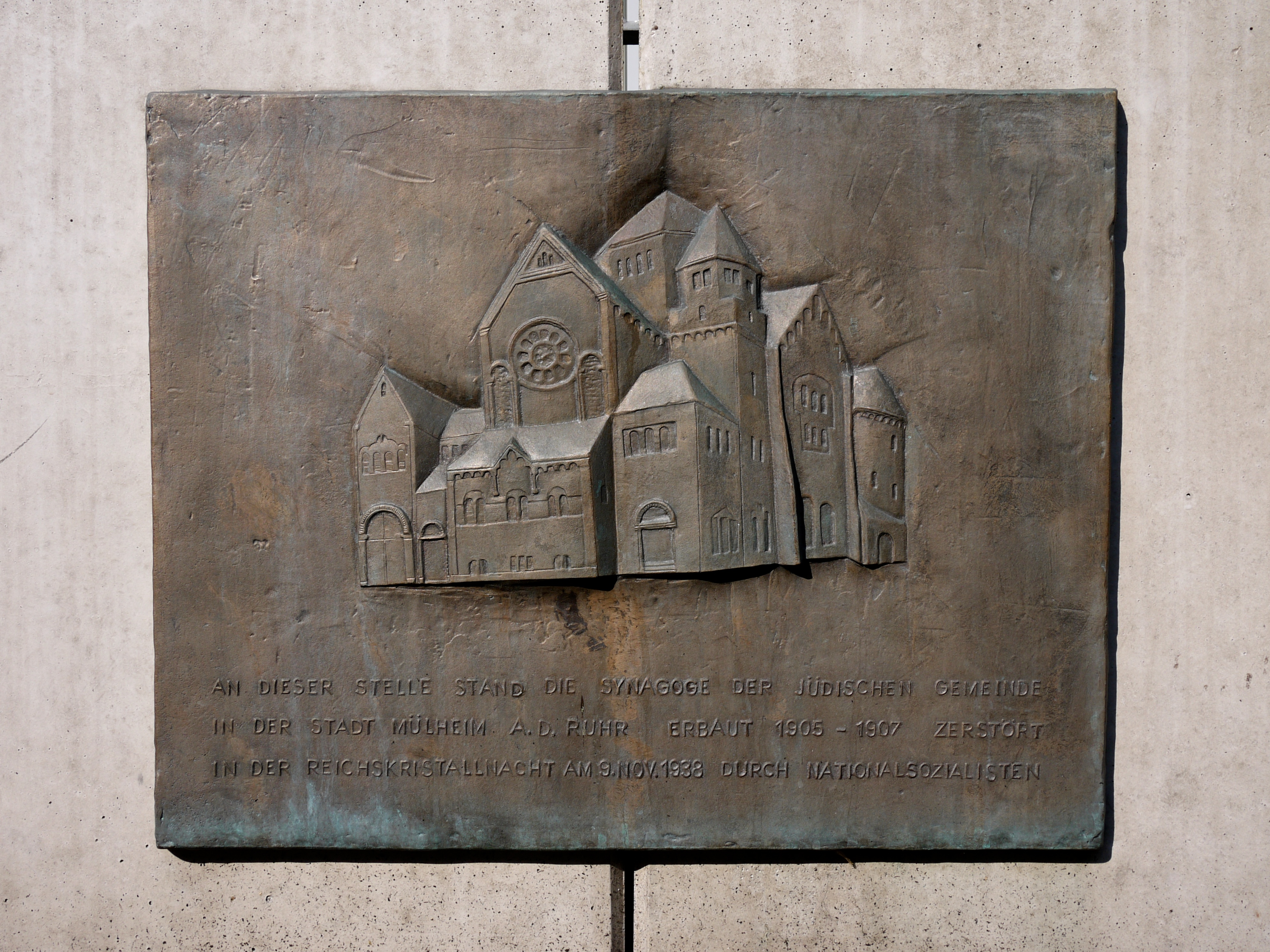 Gedenktafel am Standort der ehemaligen Synagoge Mülheim an der Ruhr